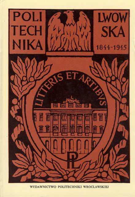 Politechnika Lwowska